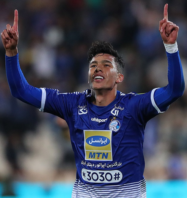 دیدار استقلال و فجرسپاسی در یک هشتم نهایی جام حذفی